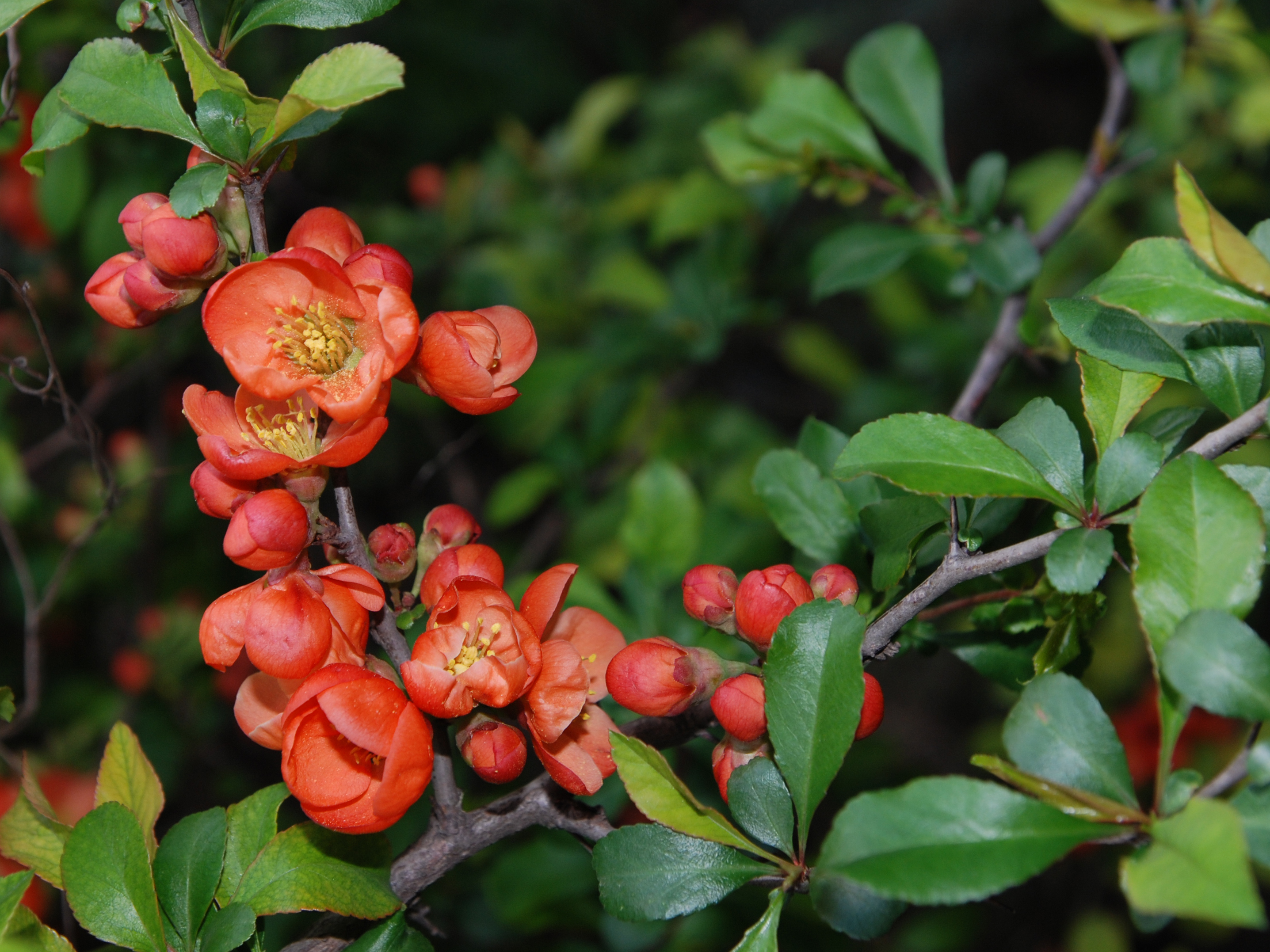 blooming Chaenomeles japonica in Obninsk